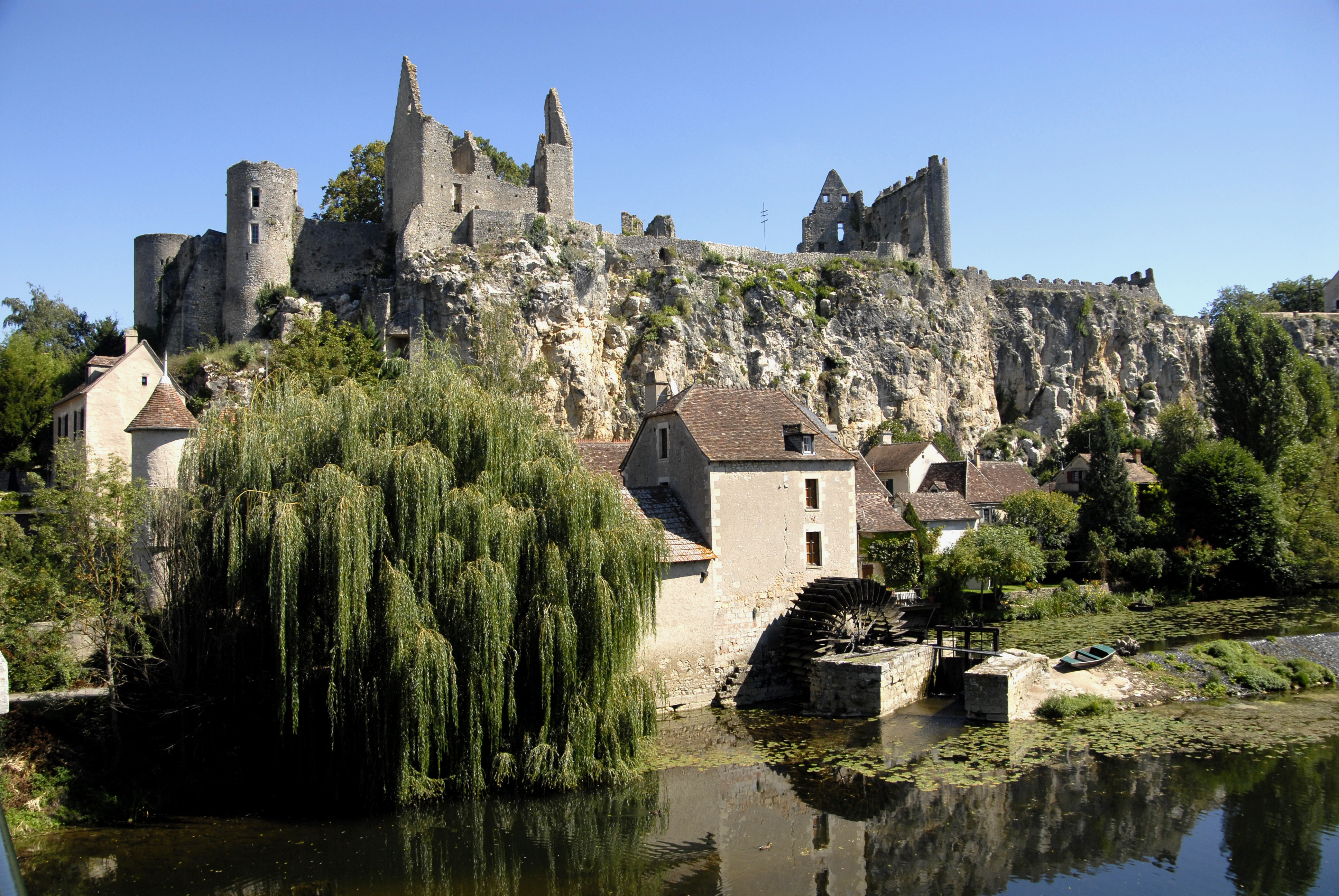 Angles-sur-l'Anglin, Burgfelsen mit Wassermühle